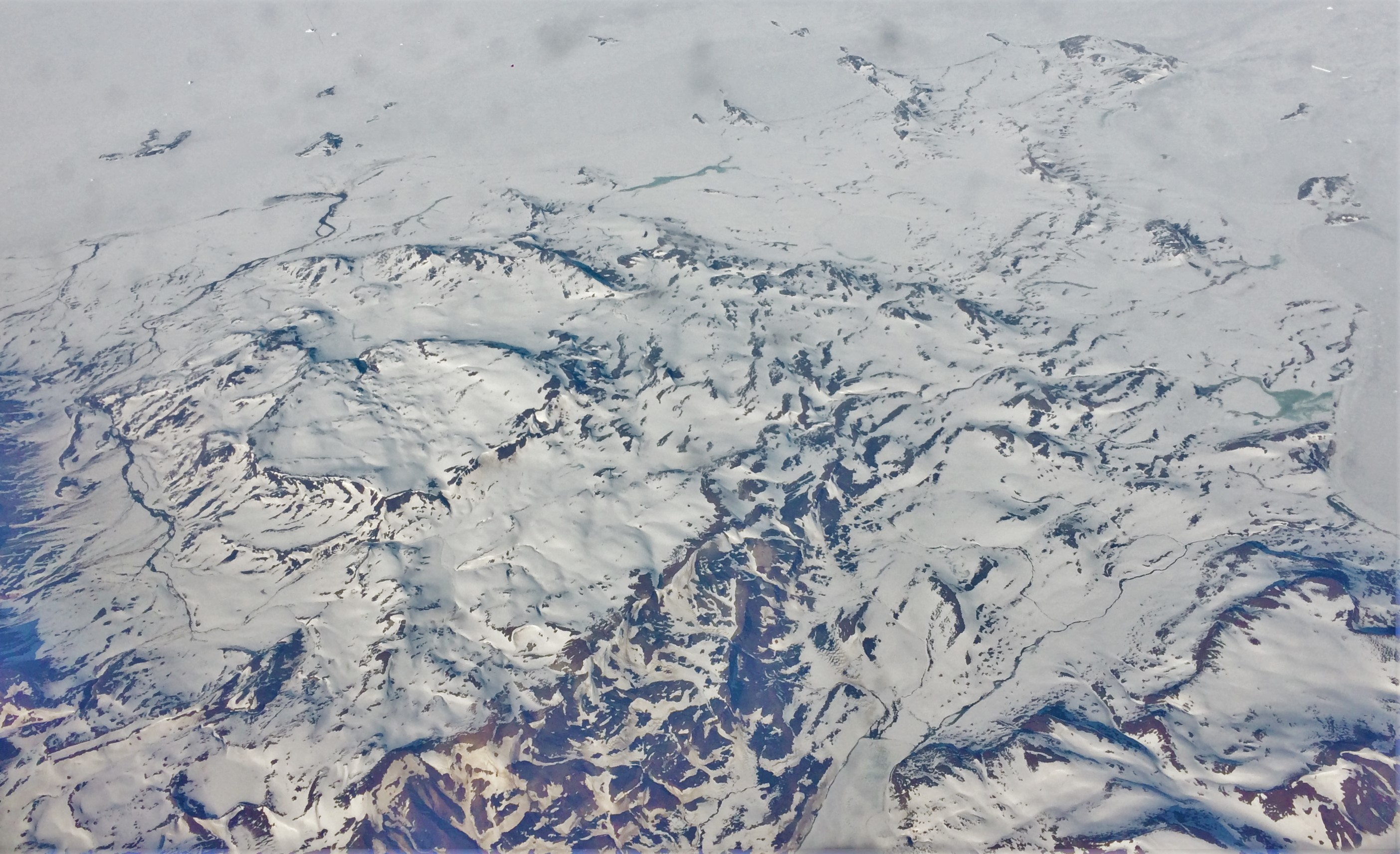 Isola Geographical Society Ø